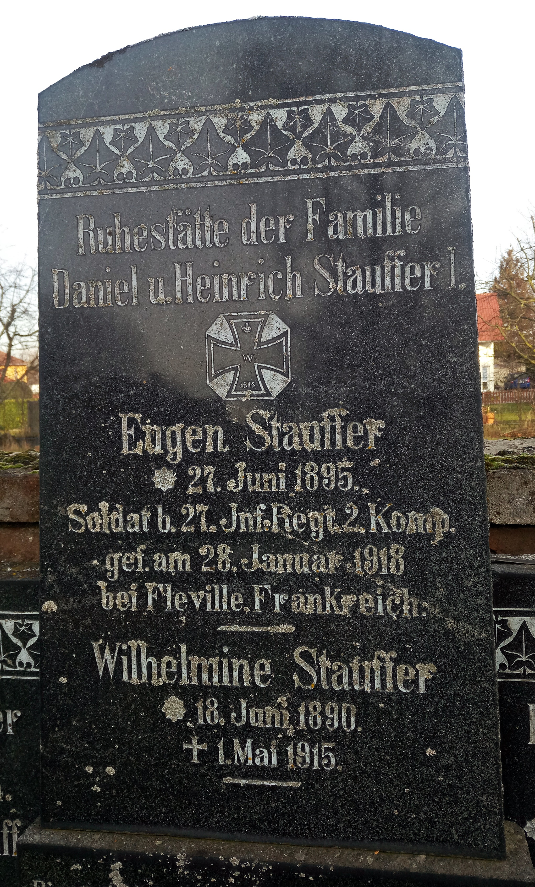 Friedhof Obersülzen; Grabstein Soldat im 27. Bay. Inf. Rgt.